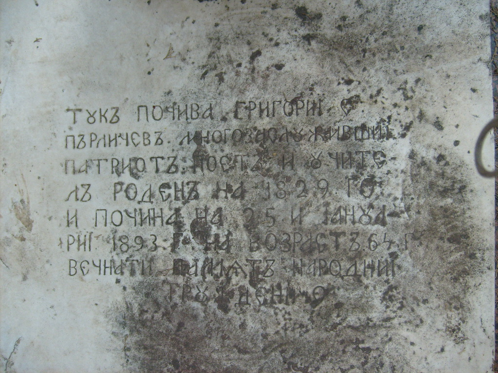 Плоча_паметник_на_Прличев